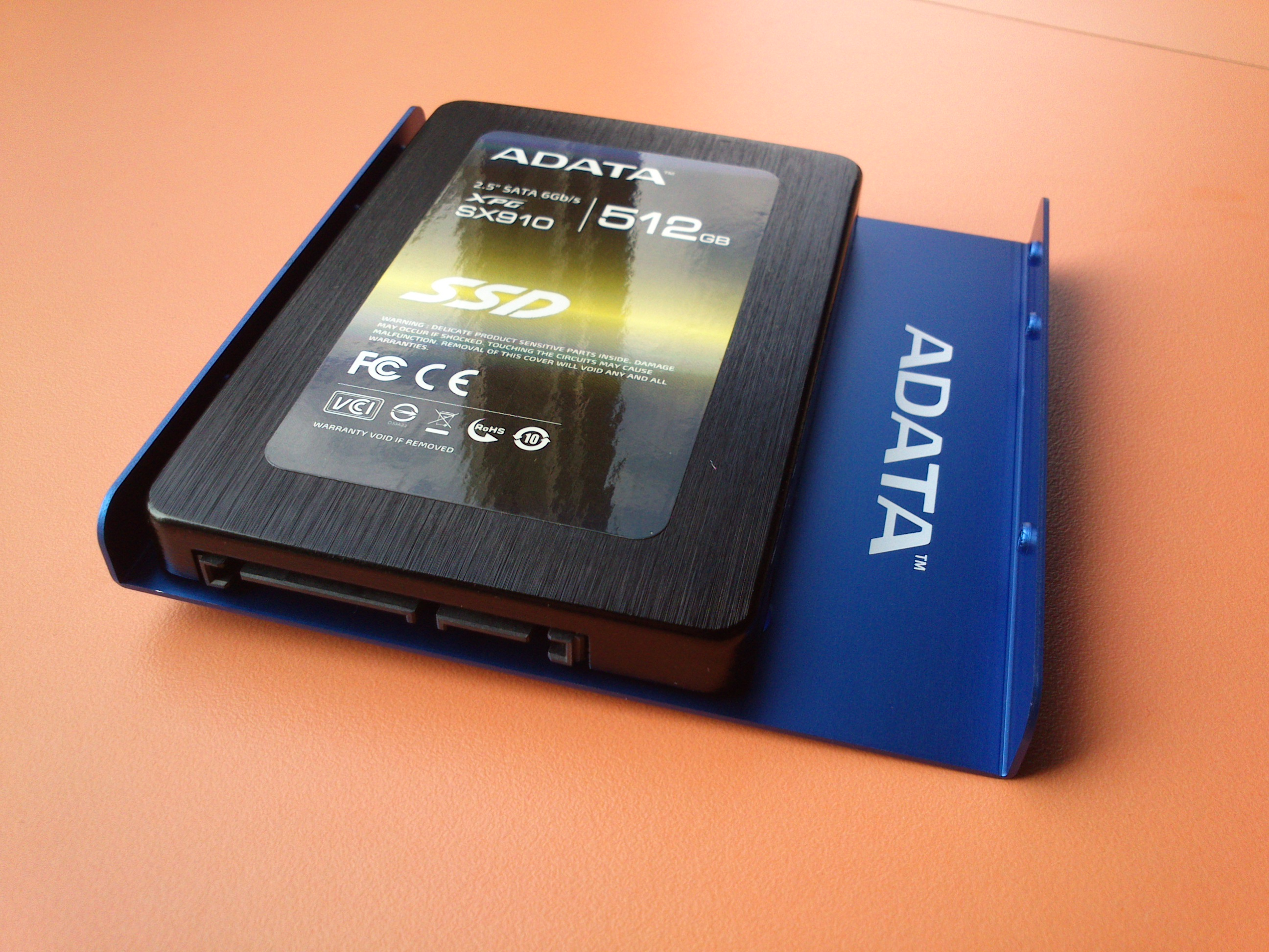 中文（台灣）: 威剛科技固態硬碟SX910 512GB。